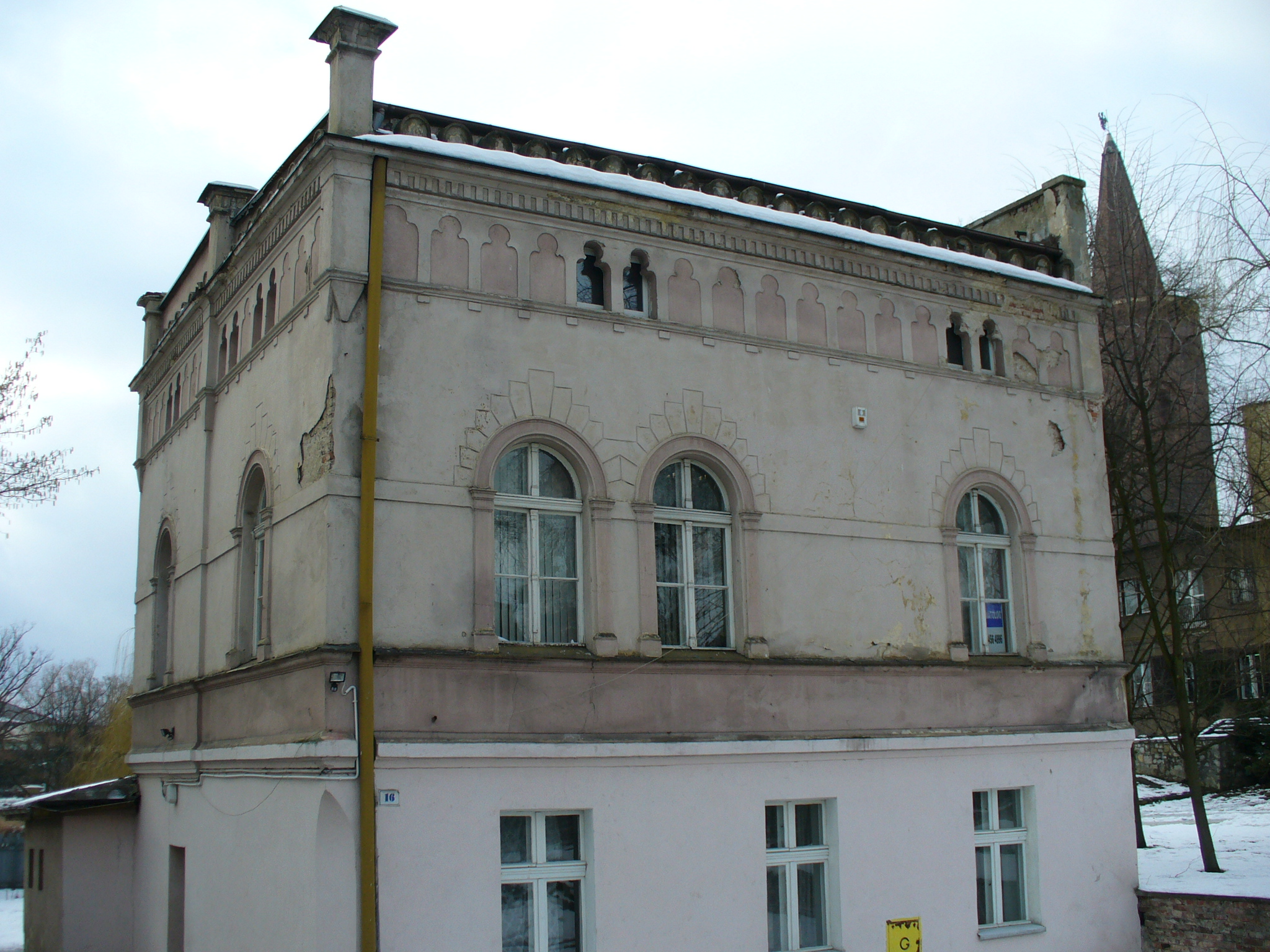 Opole - dawny dom dozorcy Nowej Synagogi